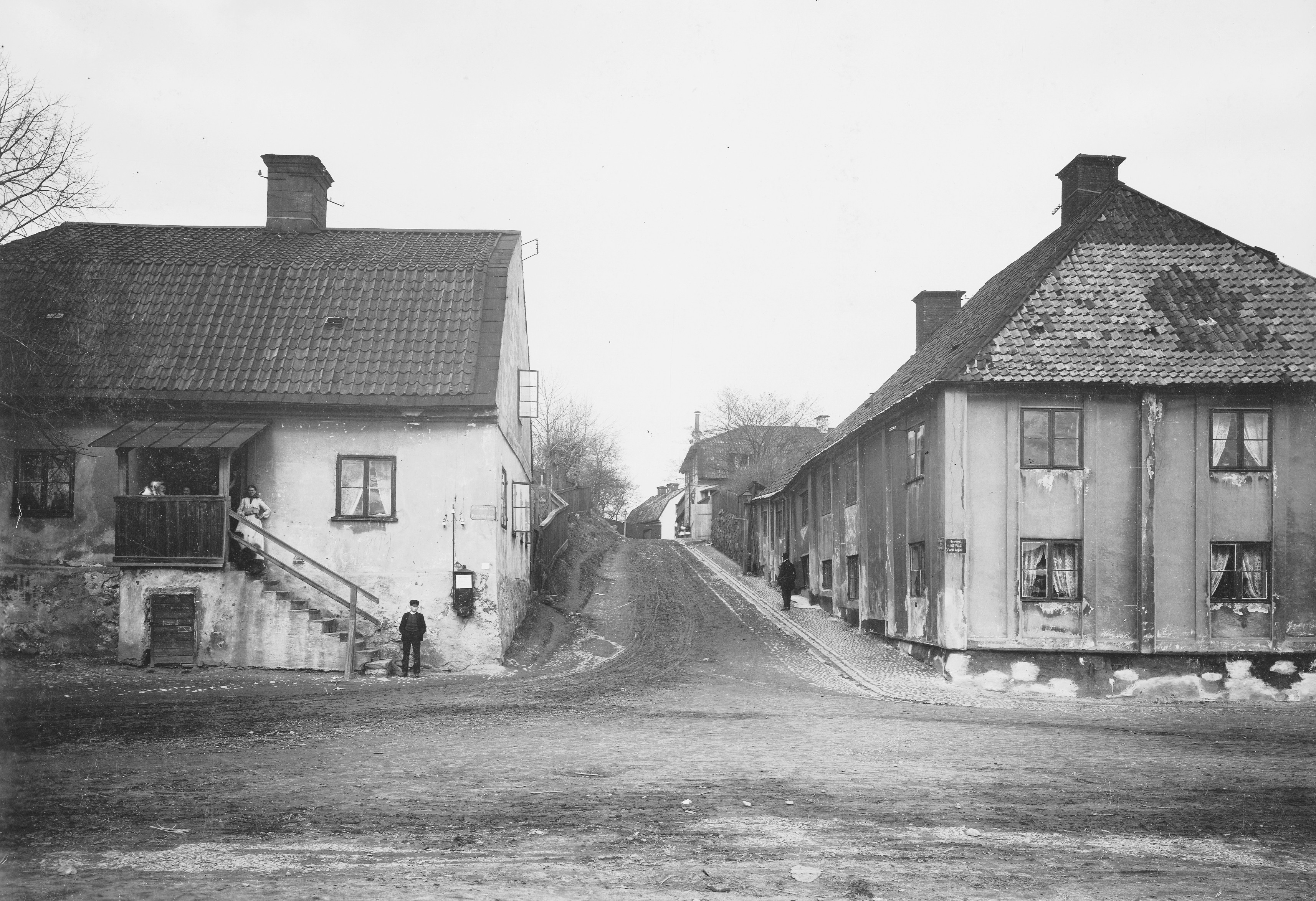 Tullgårdsgränd (dagens Ljusterögatan) mot nordost med gamla tullhuset t.v. Vy från dagens Malmgårdsvägen.